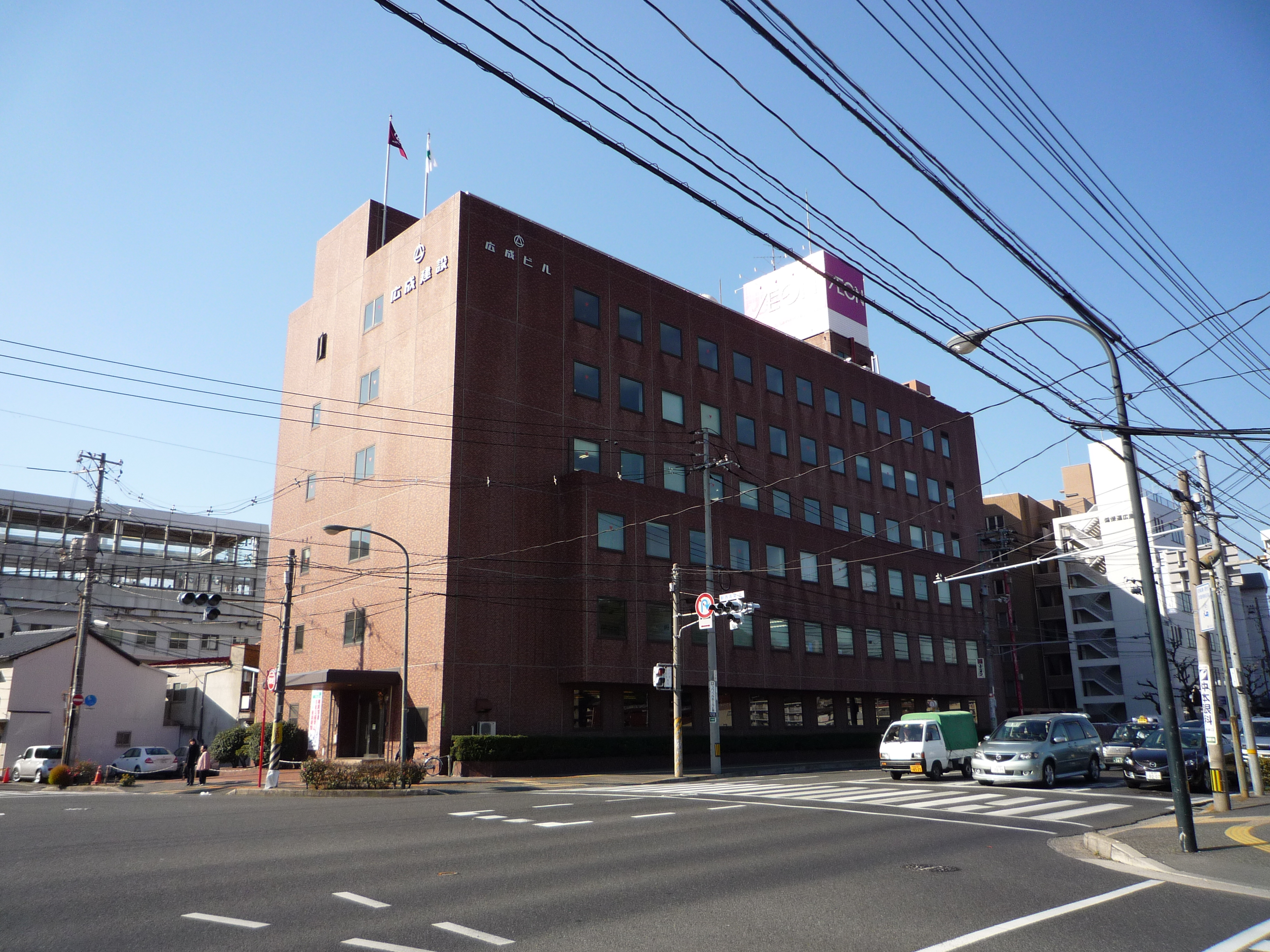 広成建設本社